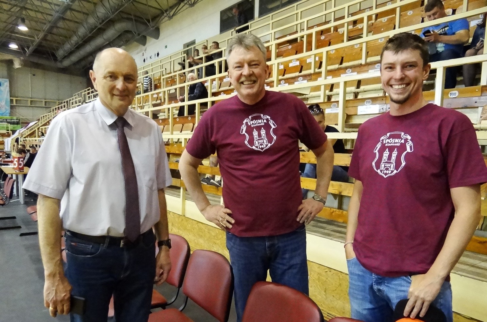 Prezes Spójni Tadeusz Gutowski i Przepióra